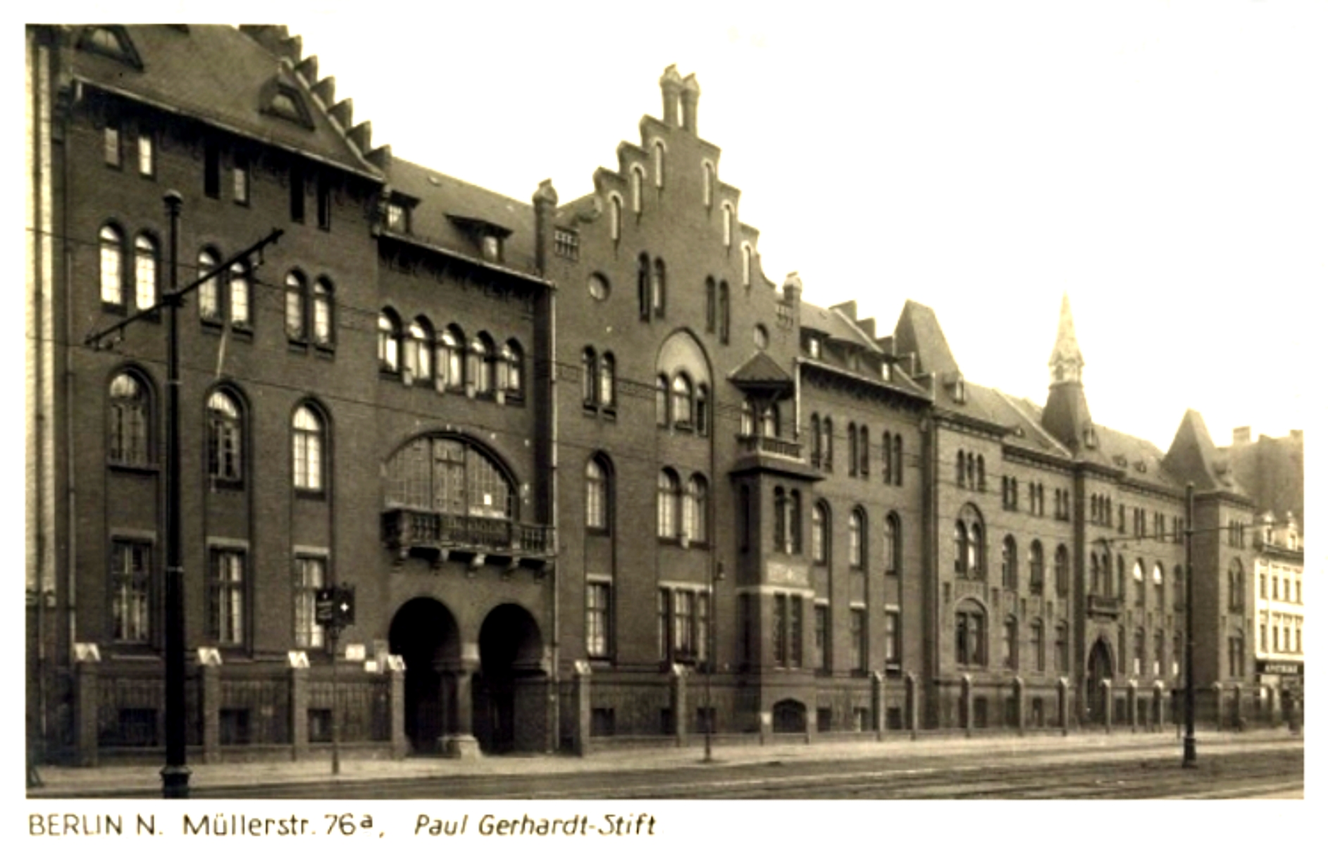 Ansicht des Paul-Gerhradt-Stifts in Berlin-Wedding; vermutlich 1930er Jahre